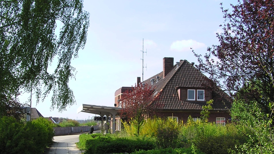 Bahnhof Büchen. Das Empfangsgebäude anno 2004. Links der Bahnsteig am Gleis 140. Im Hintergrund das Stellwerk.